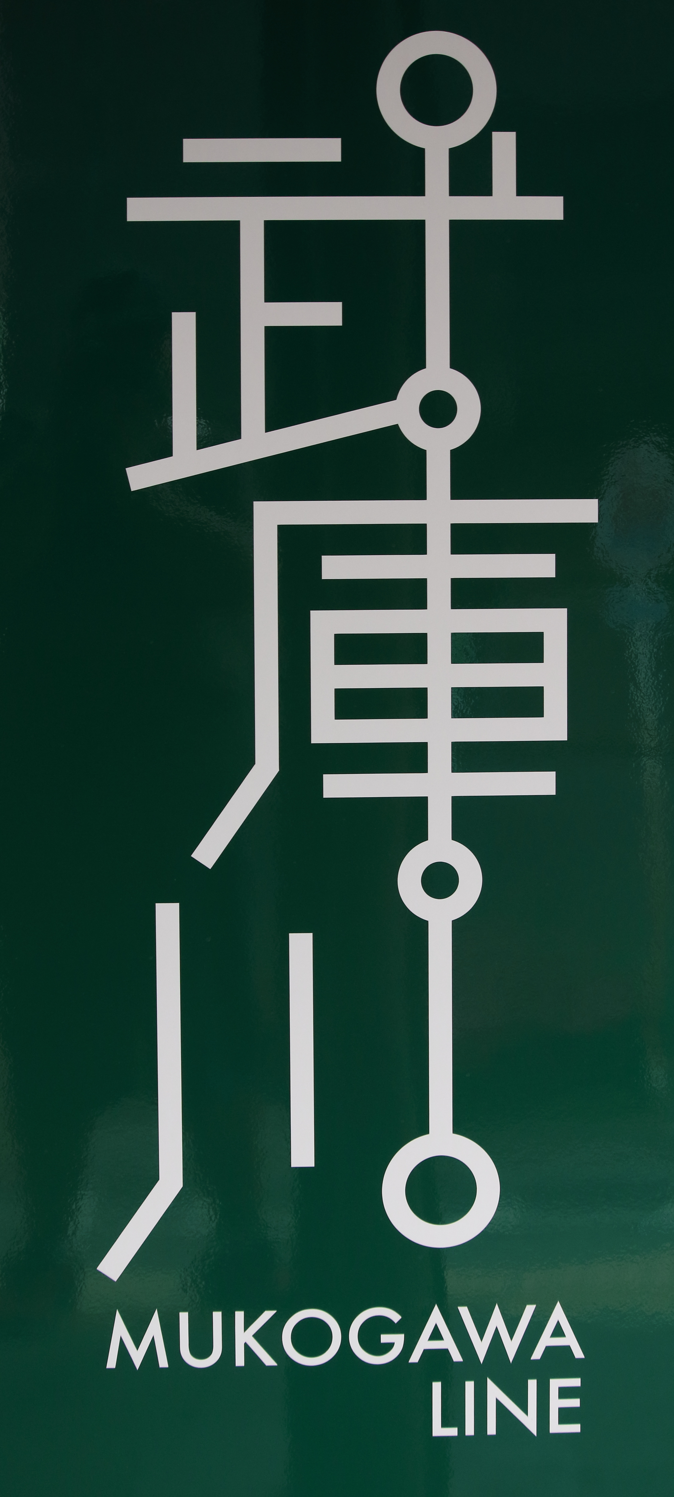 阪神武庫川線のロゴ